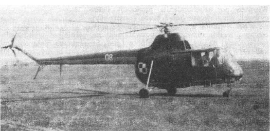 SM-2 w wersji łącznikowej